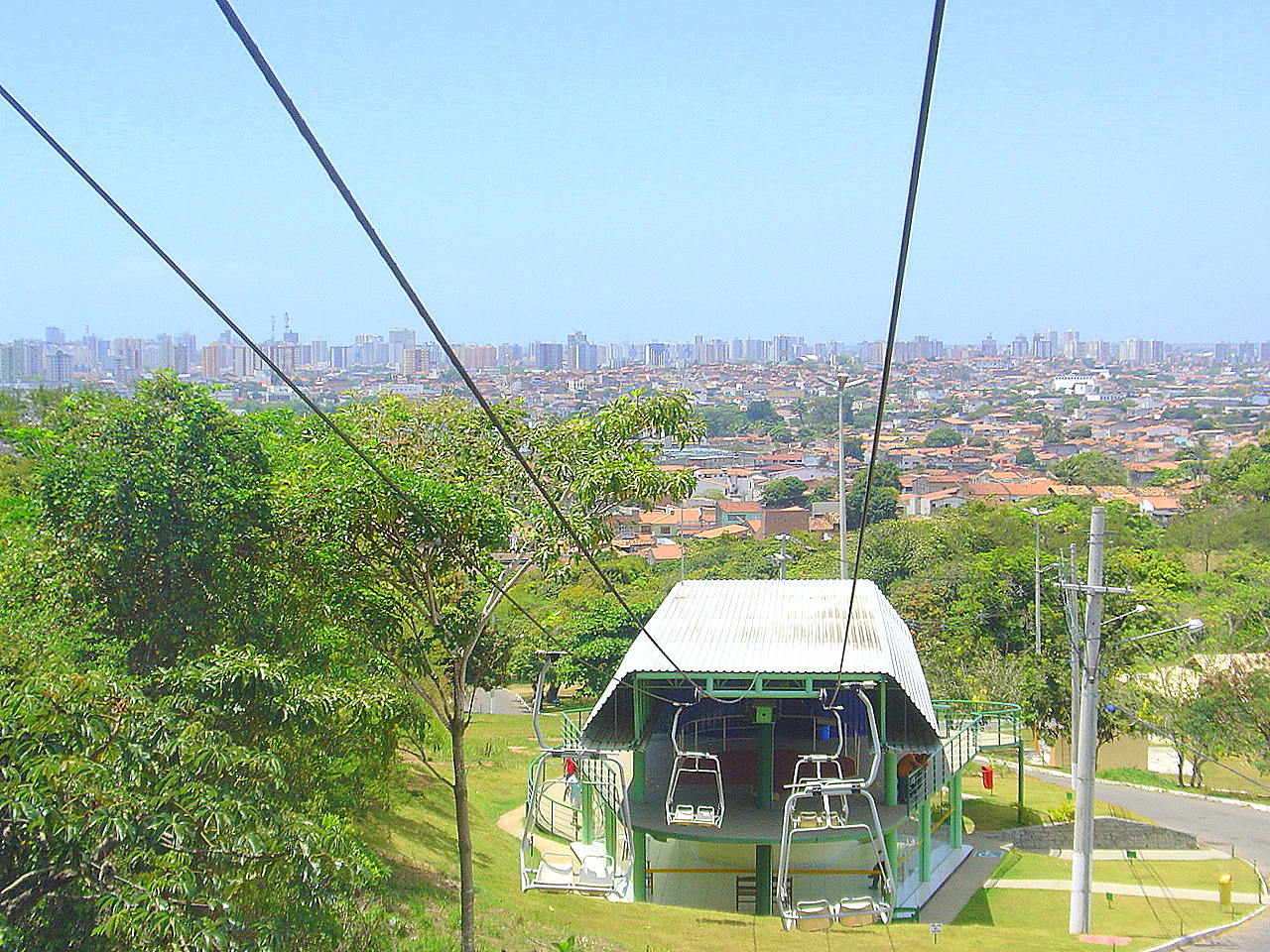 Teleférico do Parque da Cidade em Aracaju